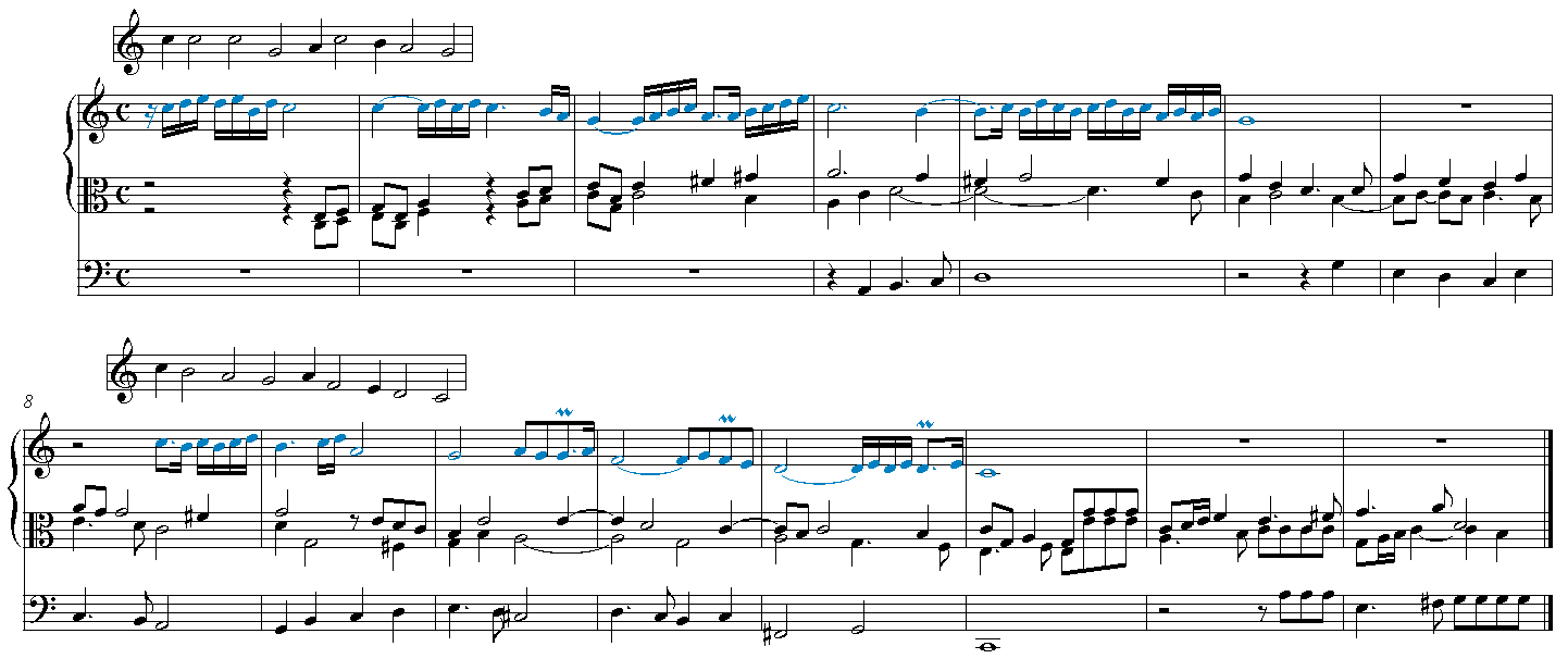 Primeros compases de Ein feste Burg ist unser Gott BuxWV 184 Musical quotation from chorale Ein feste Burg ist unser Gott by Dieterich Buxtehude (c1637–1707). Made using Sibelius 4 by Jashiin. The music quoted is in the public domain, and the image is hereby released into the public domain by Jashiin. The chorale in the upper voice is highlighted; original version of the melody included on separate staves above the main ones.